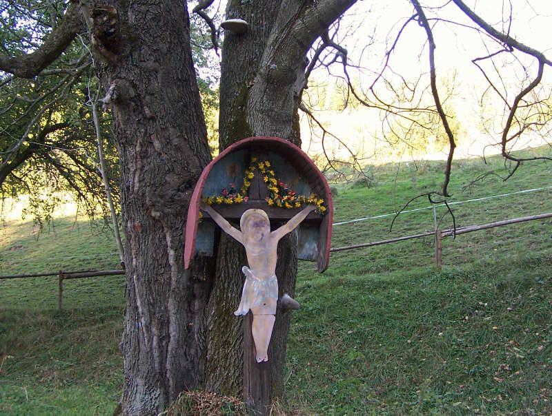 Biała Woda (Małe Pieniny)